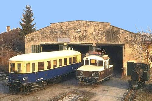 Vor unserer Museumshalle